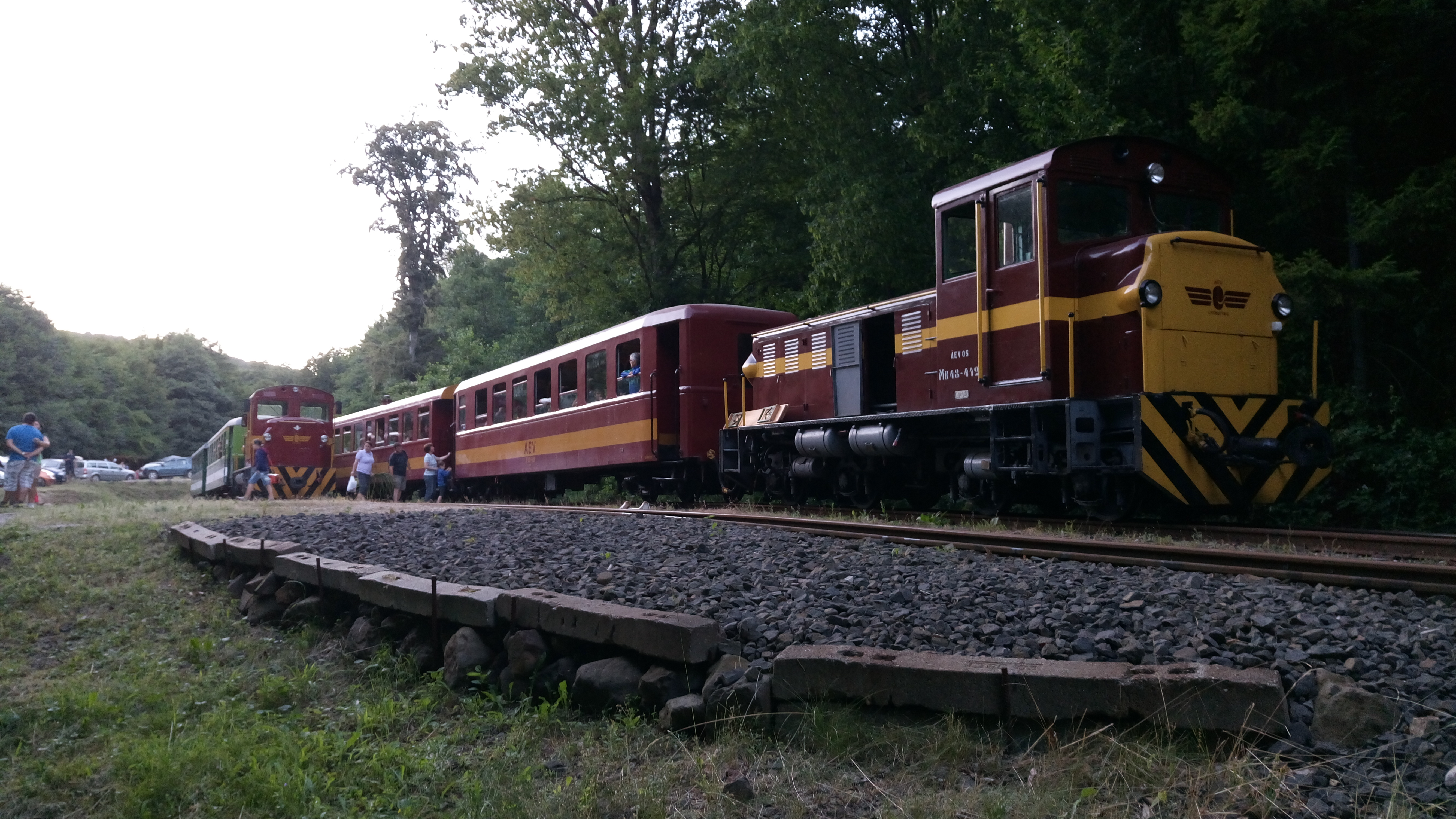 Csúcsforgalom Szalajkaházon.